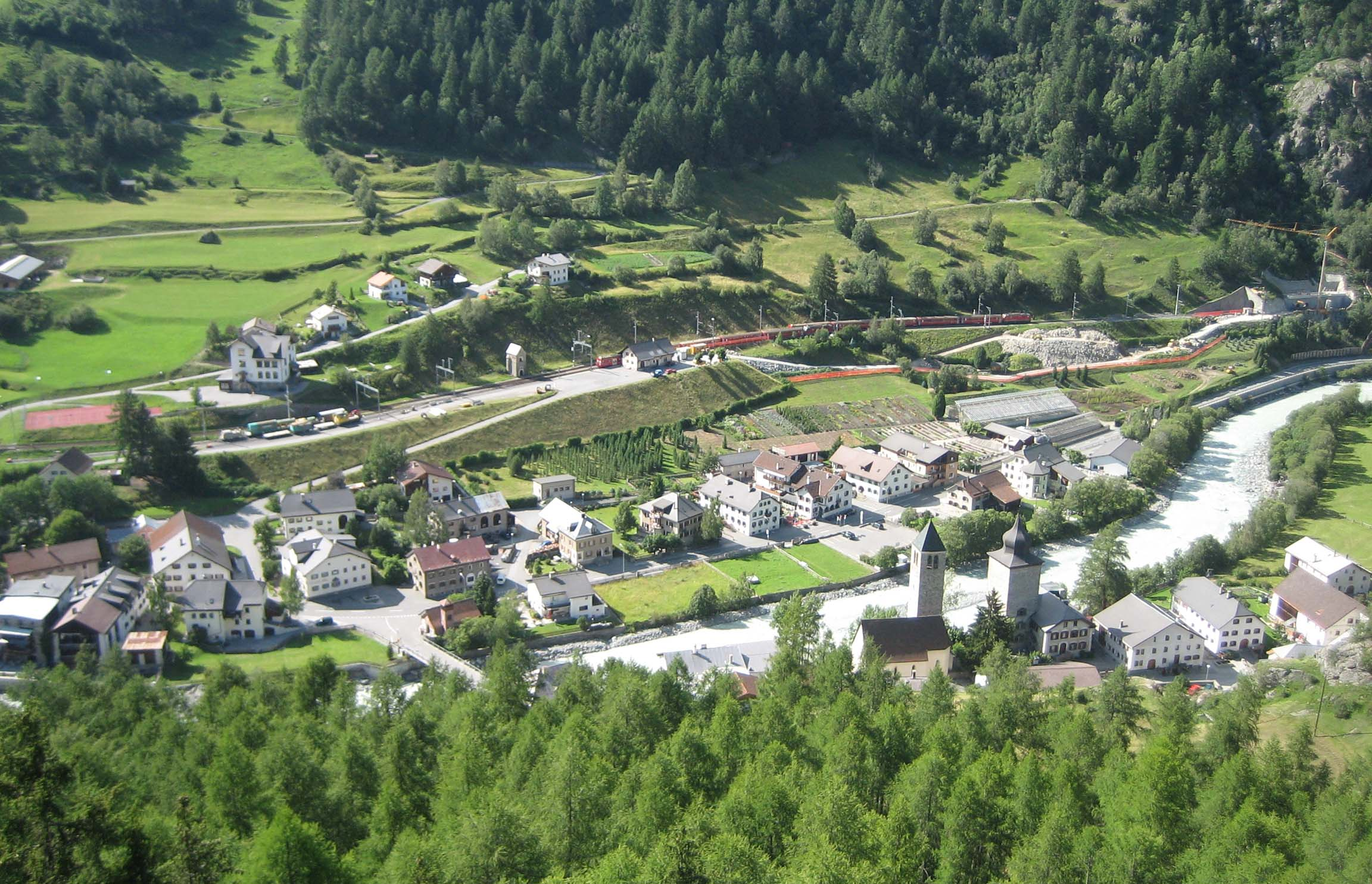 Susch